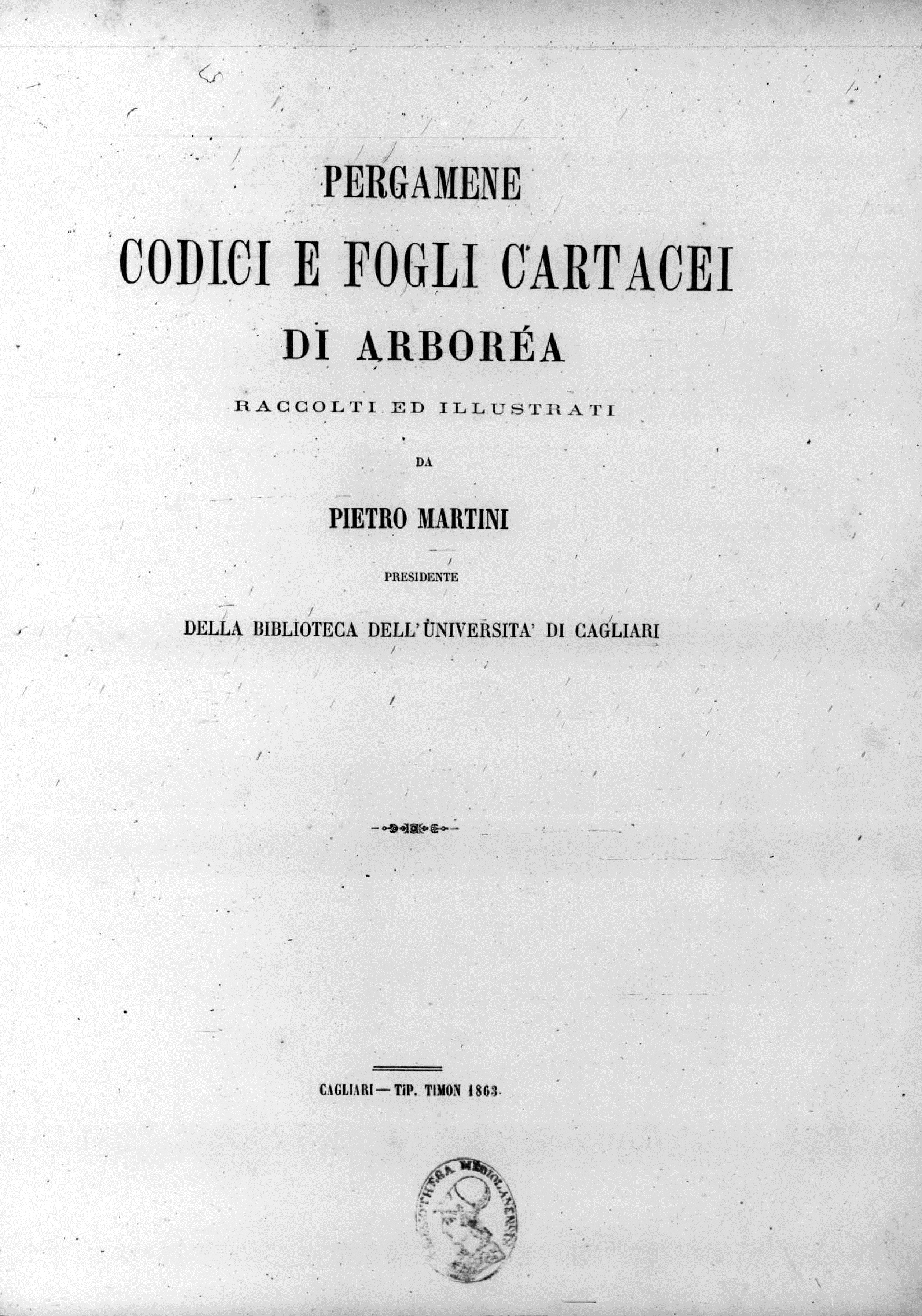 Frontespizio